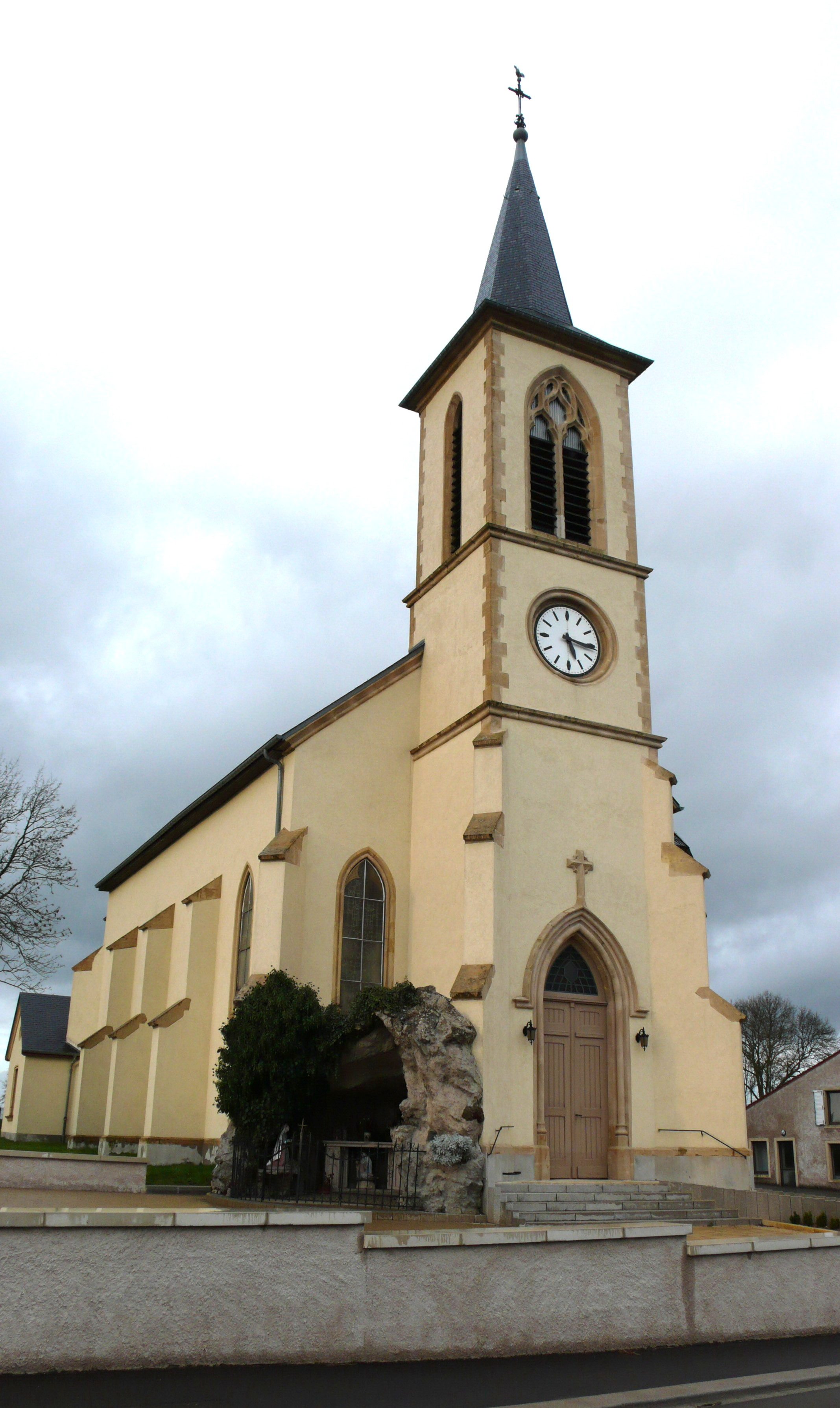 D'Kierch vun Evrange